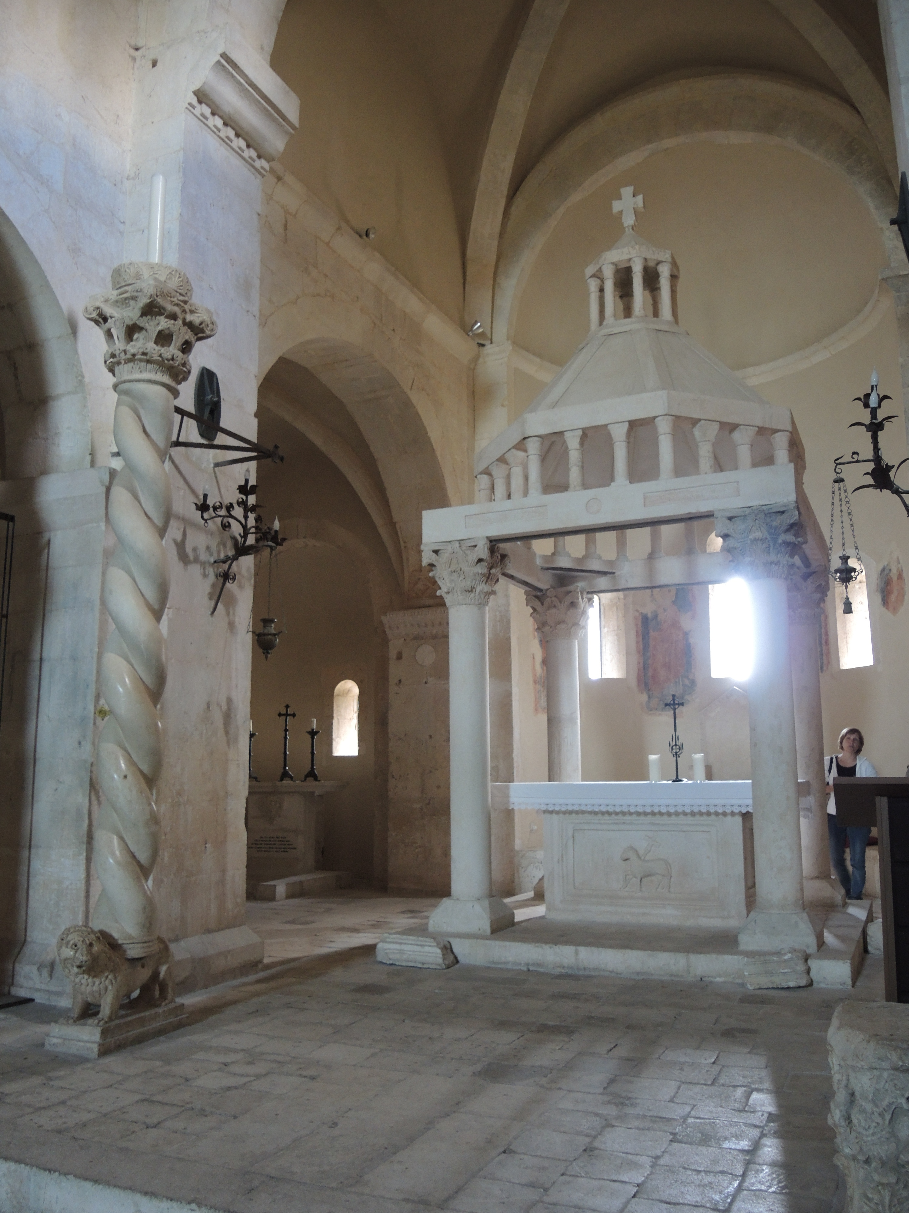 Bominaco: Abbazia di Santa Maria Assunta